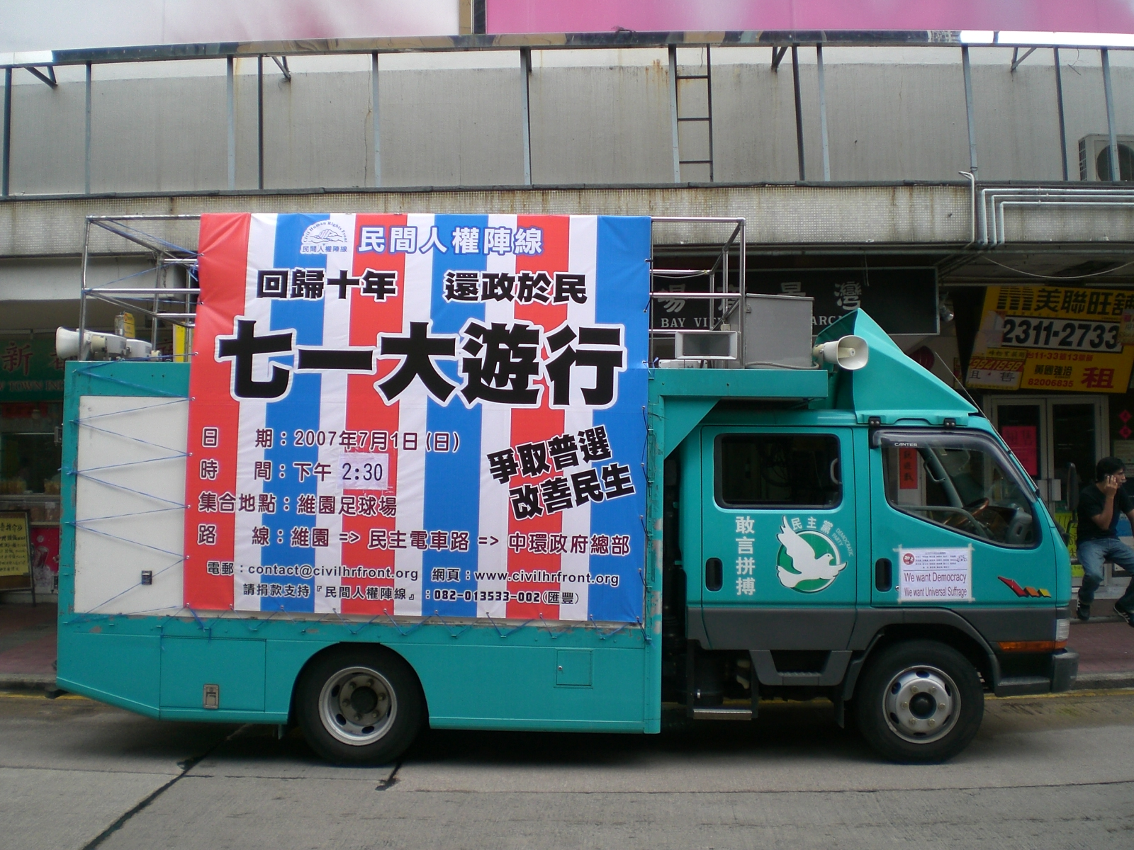 中文（中国大陆）: 香港七一大游行的民间人权阵线宣传车LM8399。